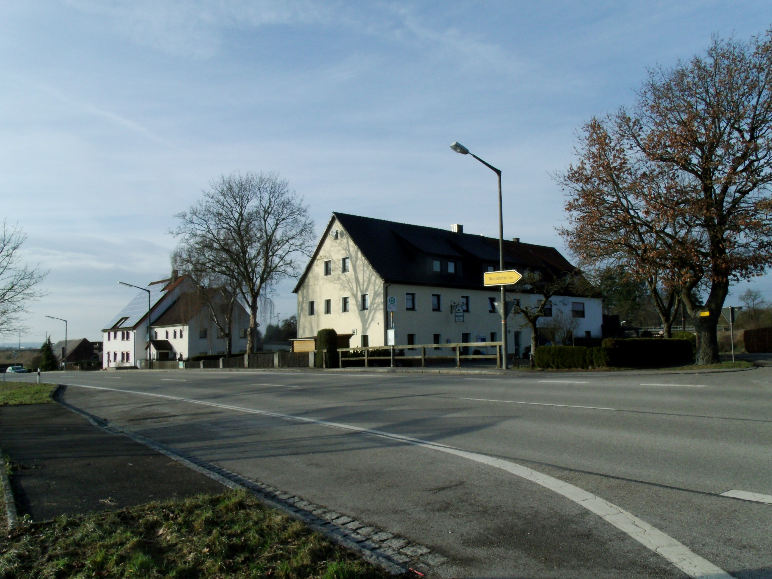 Straßenwirtshaus, Ortsteil der Stadt Leutershausen des mittelfränkischen Landkreises Ansbach